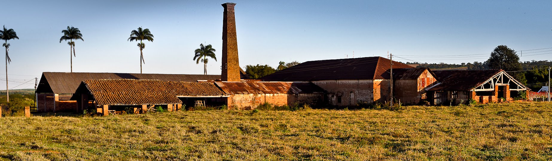 Fazenda Ibicaba, Pertence Atualmente à Cidade de Cordeirópolis-SP